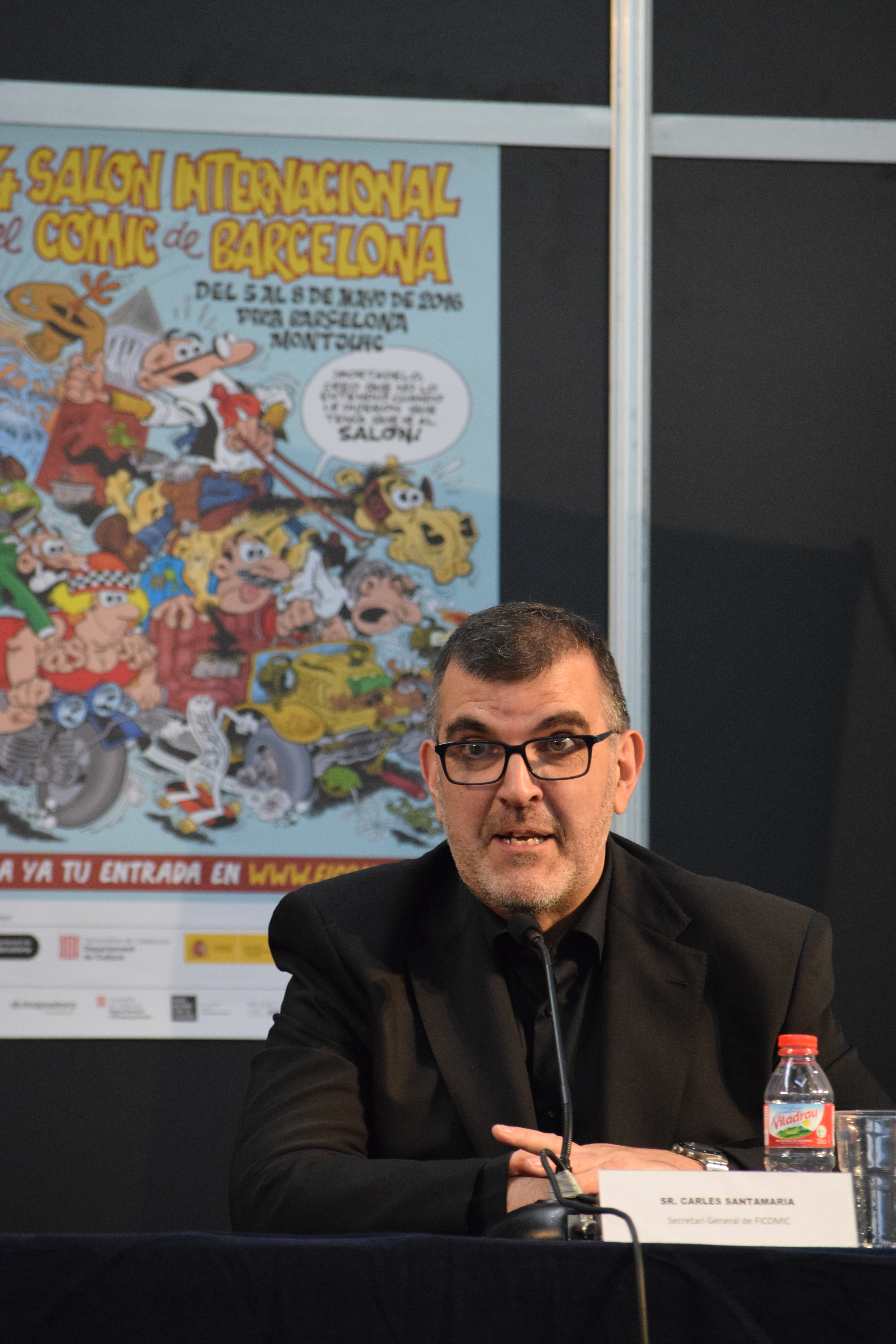 Carles Santamaría (secretari general de Ficomic) parlant a l'acte d'inaguració del 34è Saló Internacional del Còmic de Barcelona (2016).